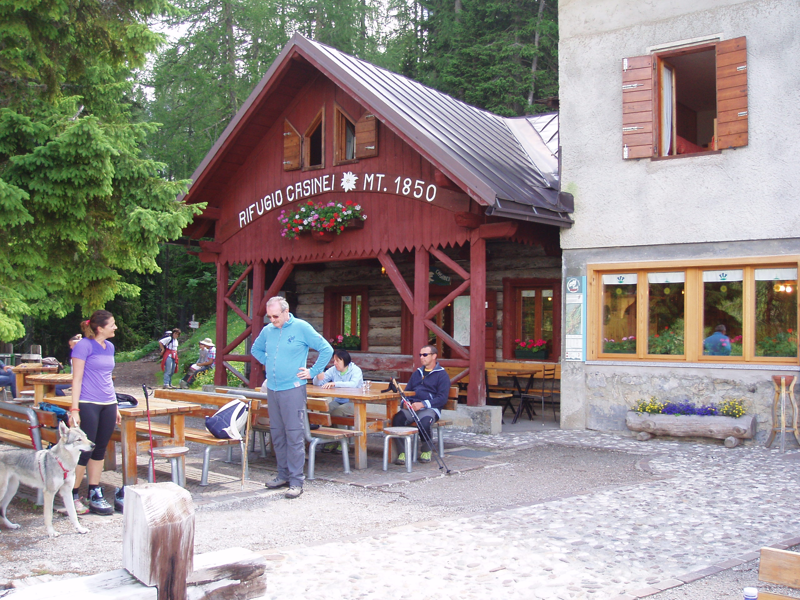 Rifugio Casinei - chata v pohoří Branta